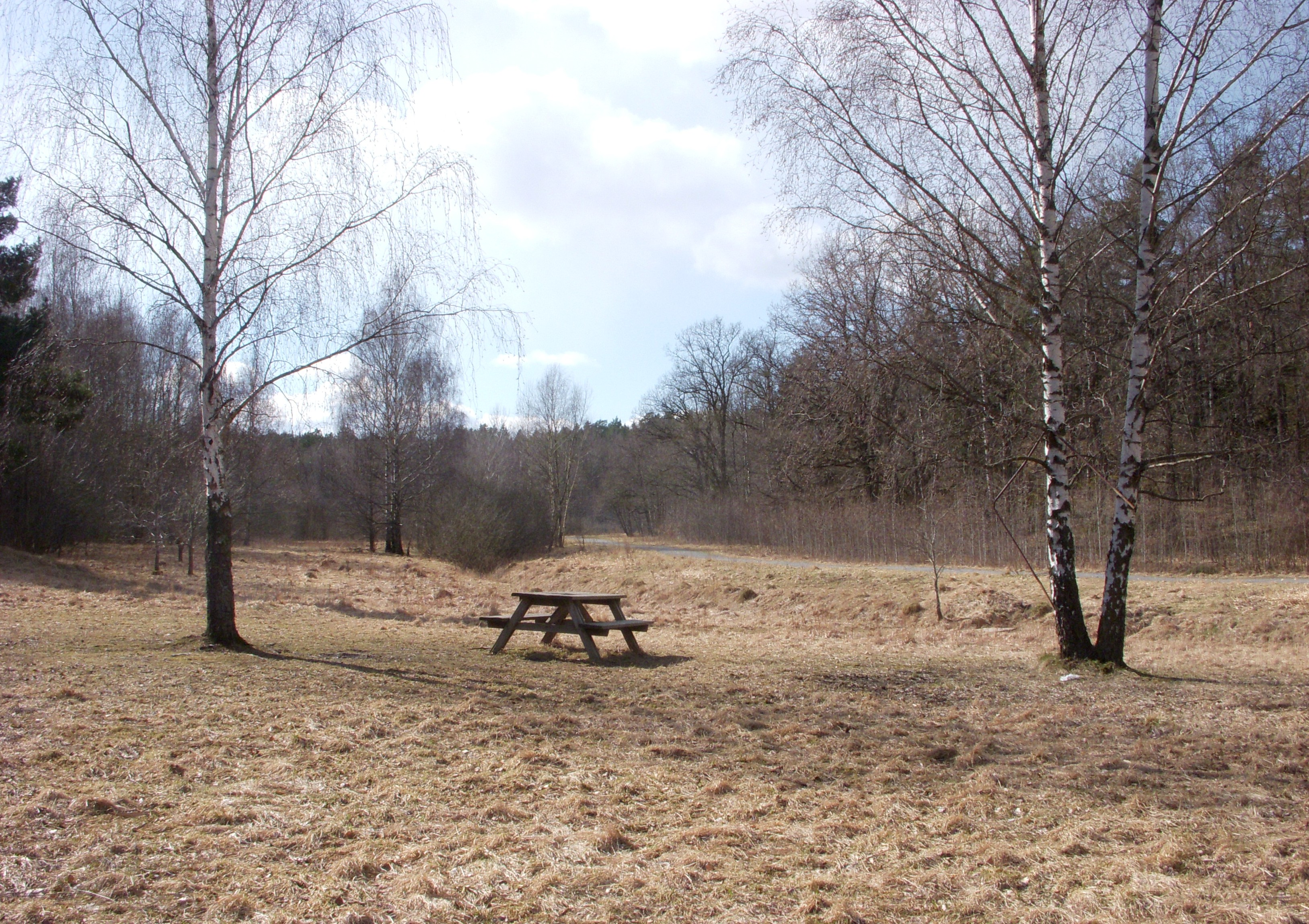 Älvsjöskogens östra del